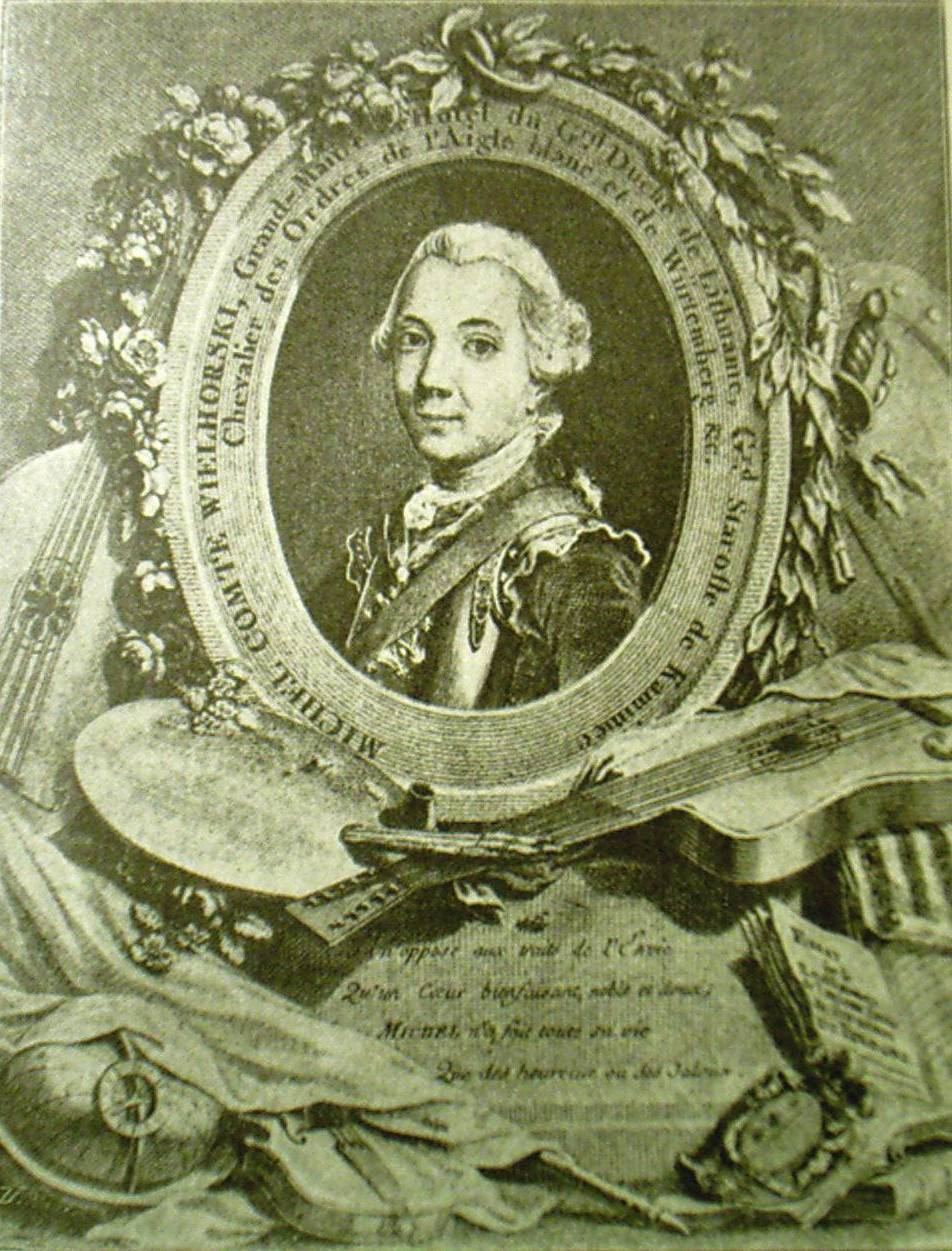 Michał Wielhorski